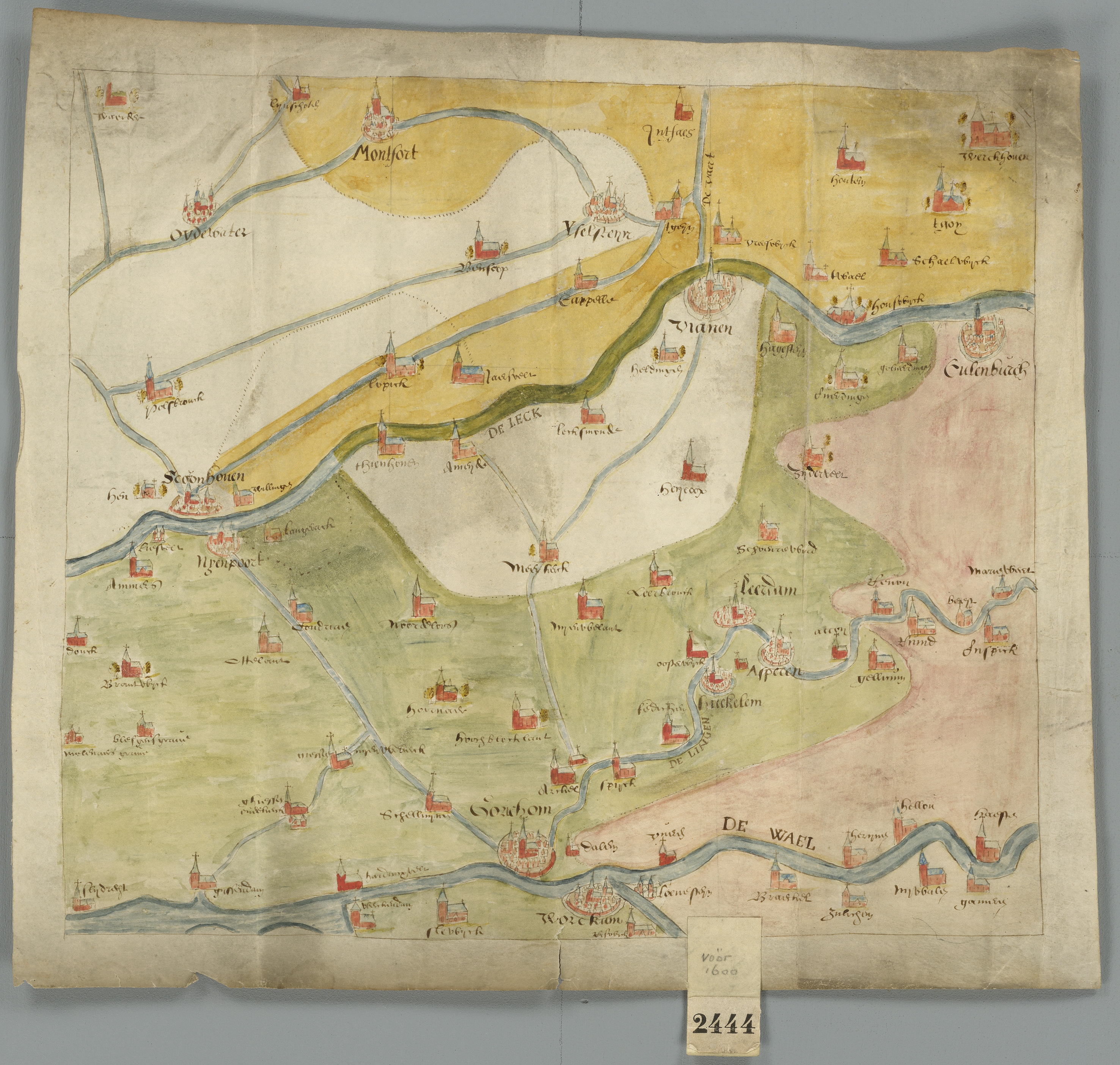 Kaart van de Vijfheerenlanden en de aangrenzende landen, uit de 16de eeuw Deze kaart is onderdeel van de Verzameling Binnenlandse Kaarten Hingman. Deze collectie is door het Provinciaal Historisch Centrum Zuid-Holland gedigitaliseerd, ten behoeve van de website De collectie wordt bewaard bij het Nationaal Archief.